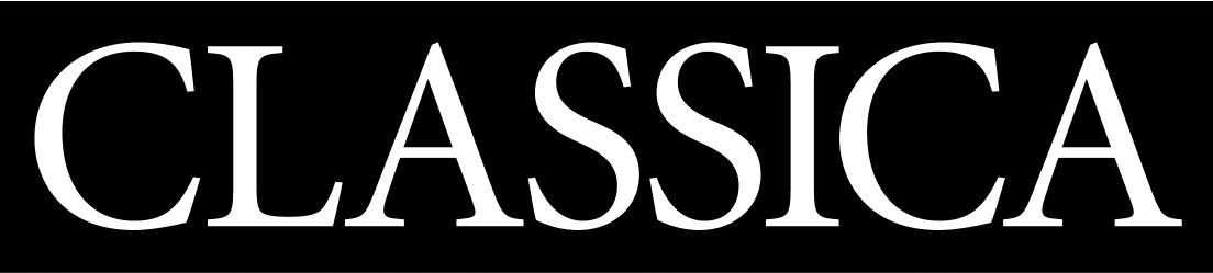 Logo du magazine Classica. ©Classica